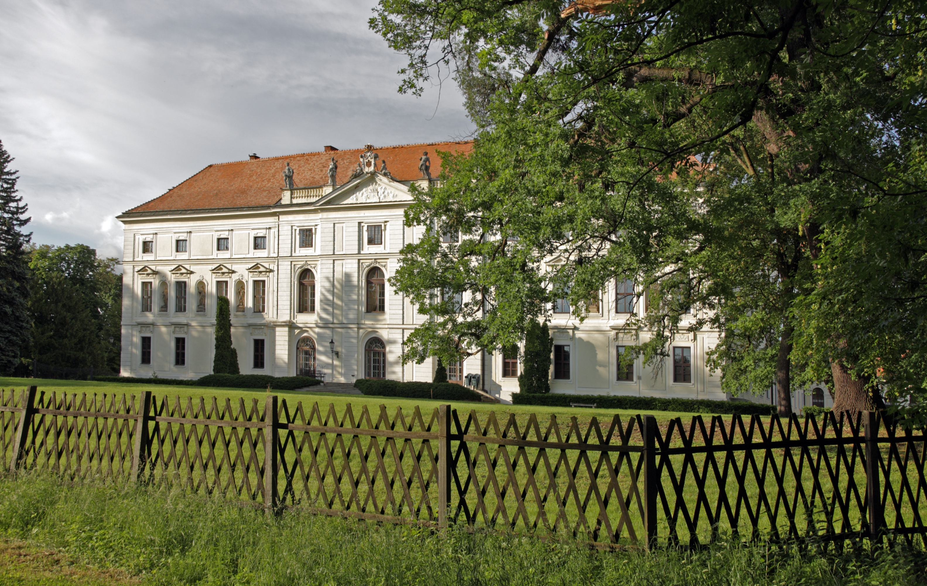 Židlochovice, zámek a park.